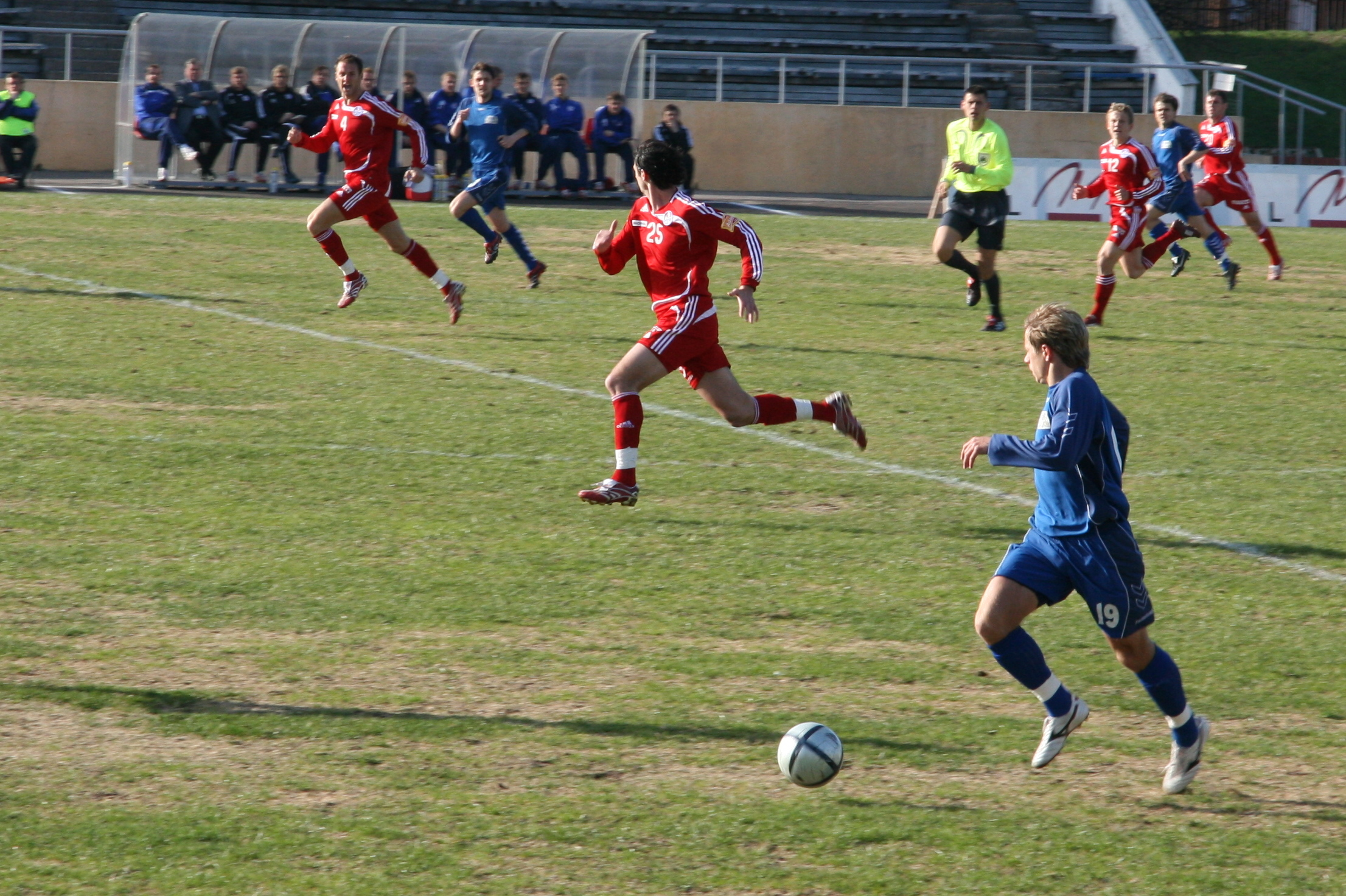 Latvian Virslīga football match, #19 Dmitrijs Skobļakovs on attack